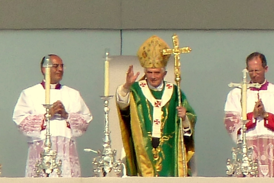 Benedikt XVI. an der päpstlichen Sonntagsmesse anlässlich seiner dritten apostolischen Heimatsreise in Deutschland. Der Papst begrüsst die 100'000 Messe-Pilger in Freiburg.